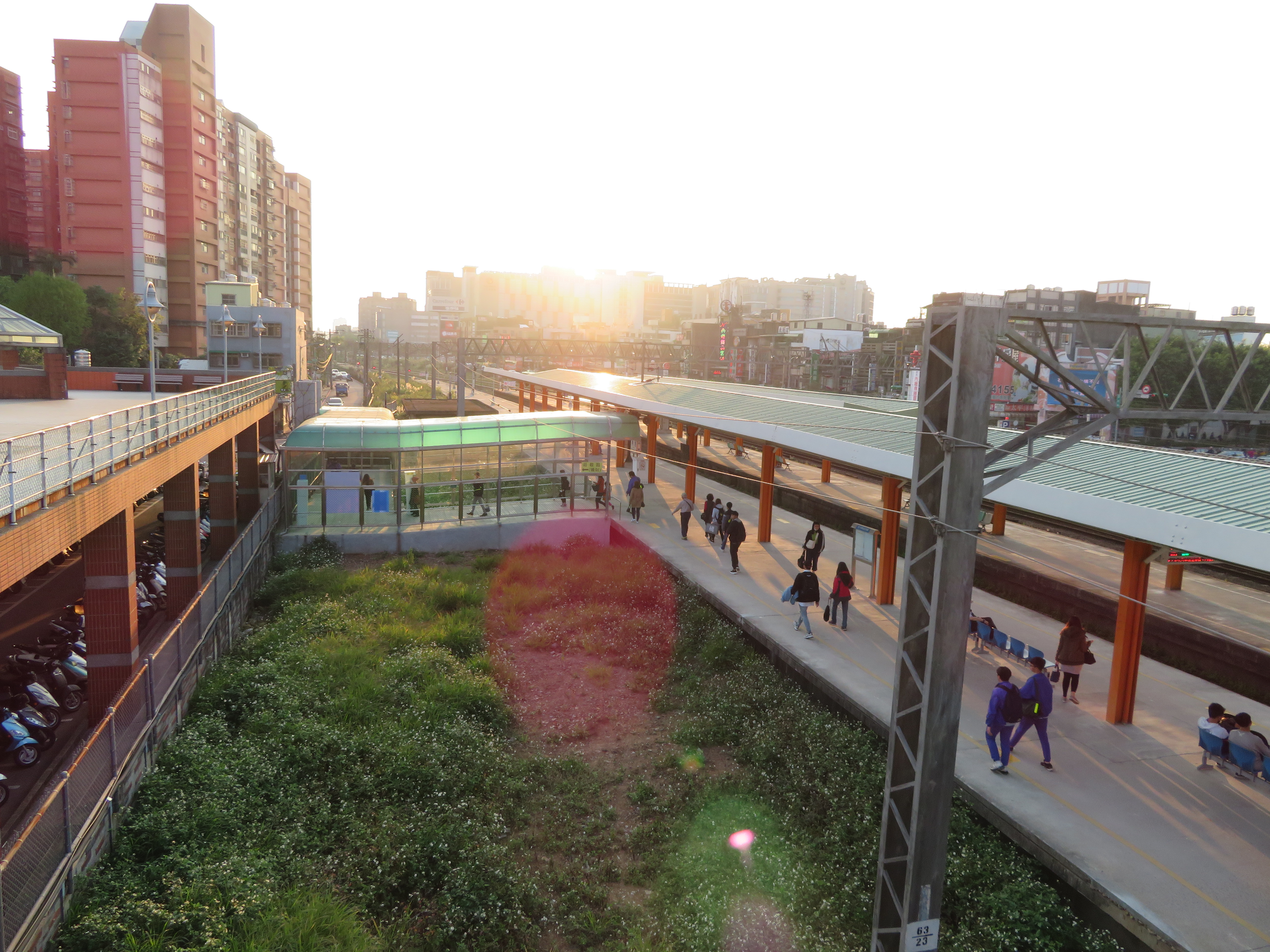 從天橋俯視內壢車站第三月台與後站連通道。